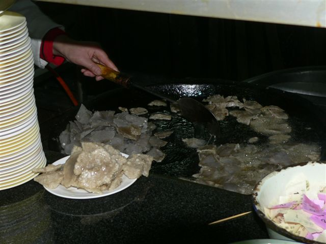 煎灌肠 2005年2月拍摄于北京东四丰年灌肠店